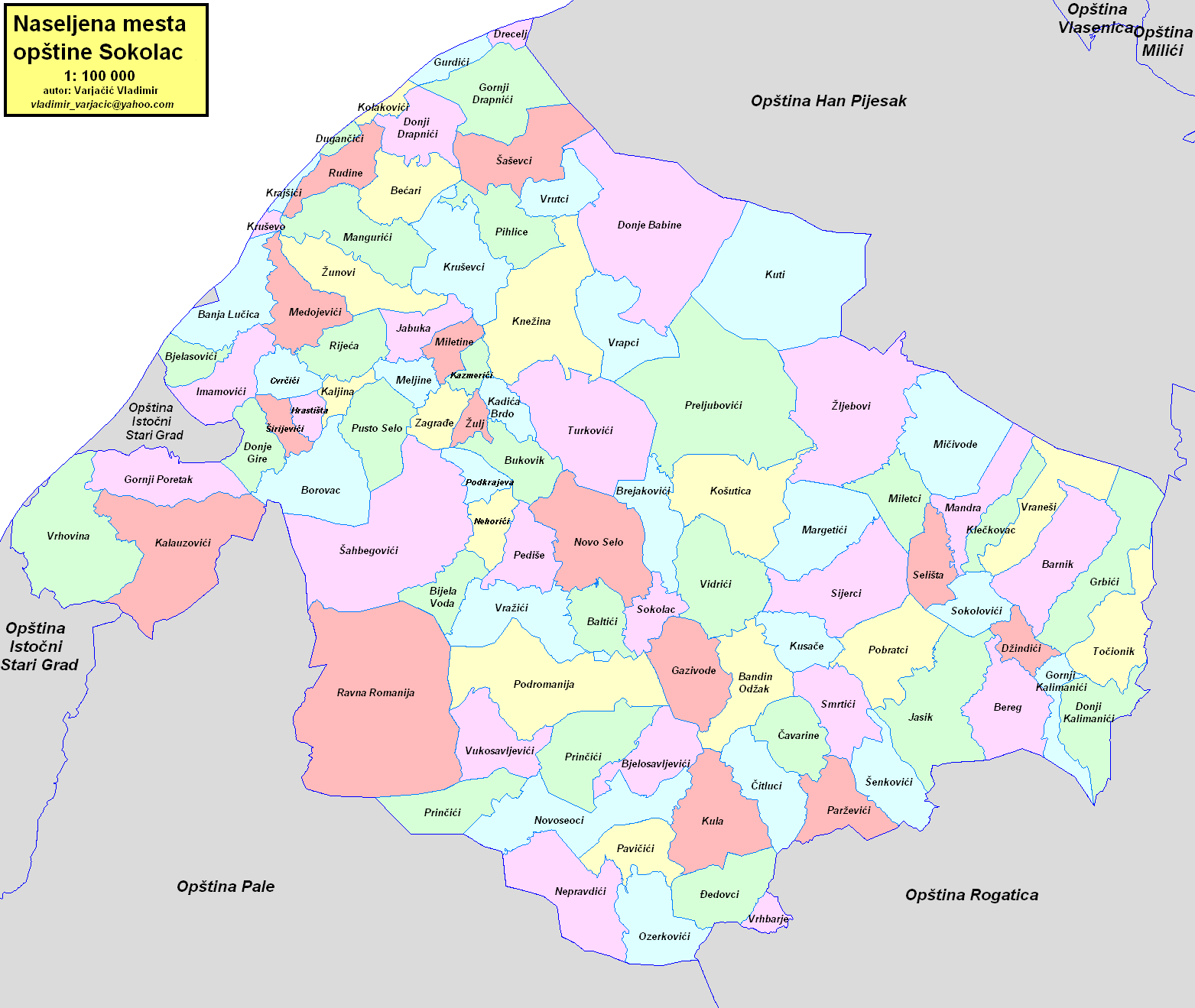 Opština Sokolac